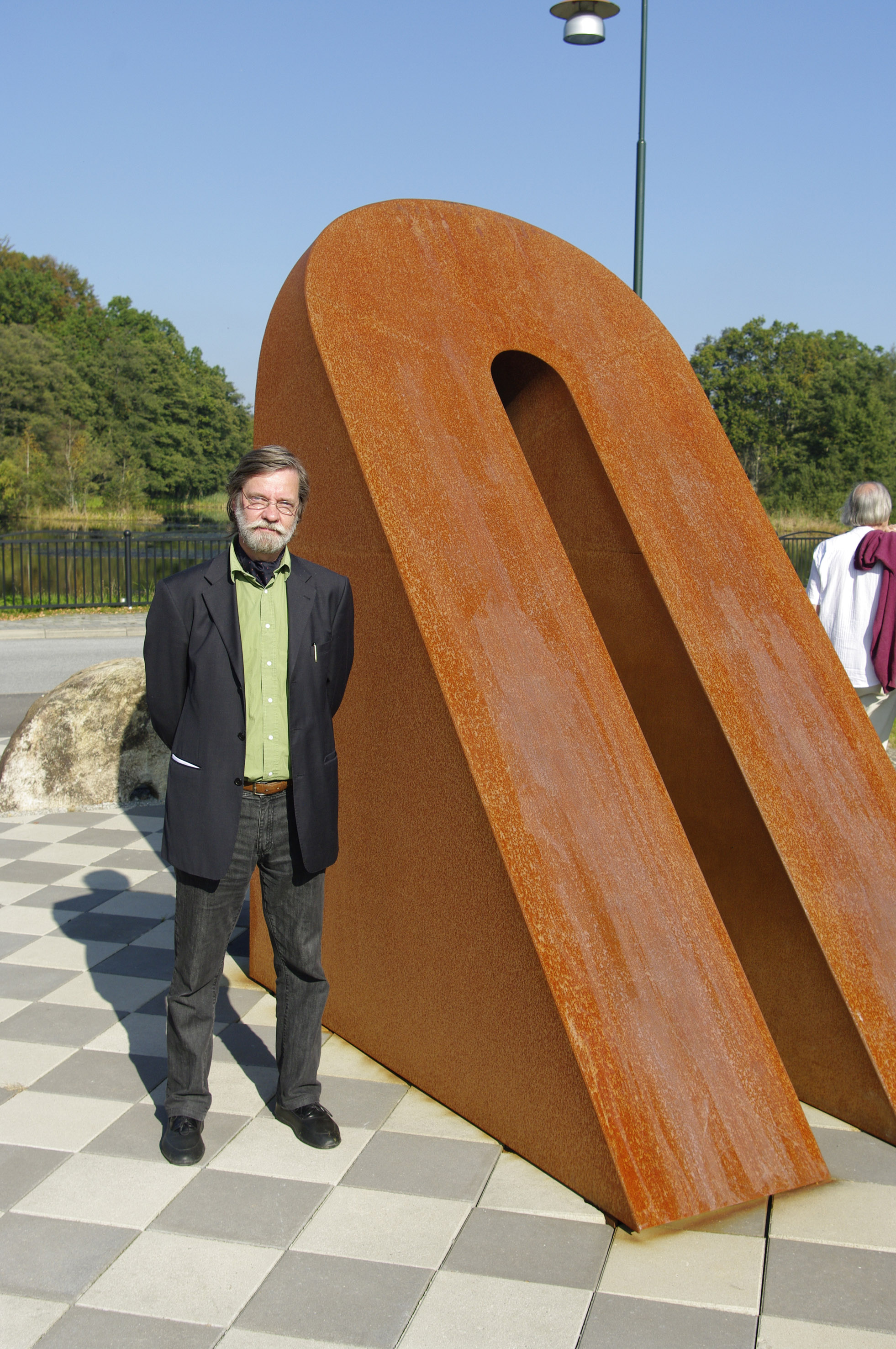 Konstnären Lars Ekholm vid sitt verk Mittelen i Höör, Sverige.